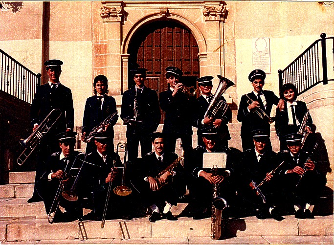 Grupo de la Banda de Música "La Lira" de Monforte del Cid en la Iglesia de Ntra. Señora de las Nieves de la población